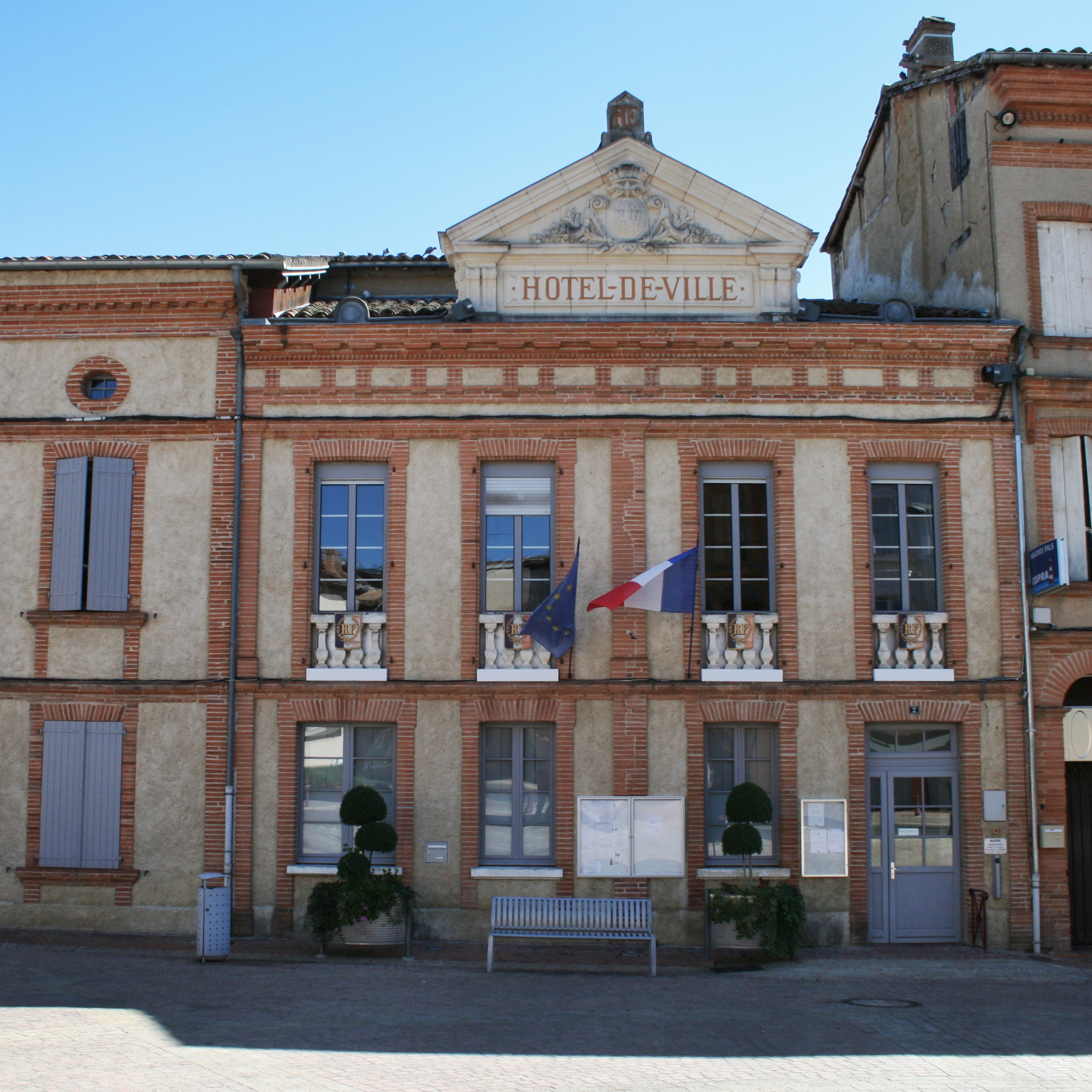 Mairie de la commune de Samatan, dans le Gers